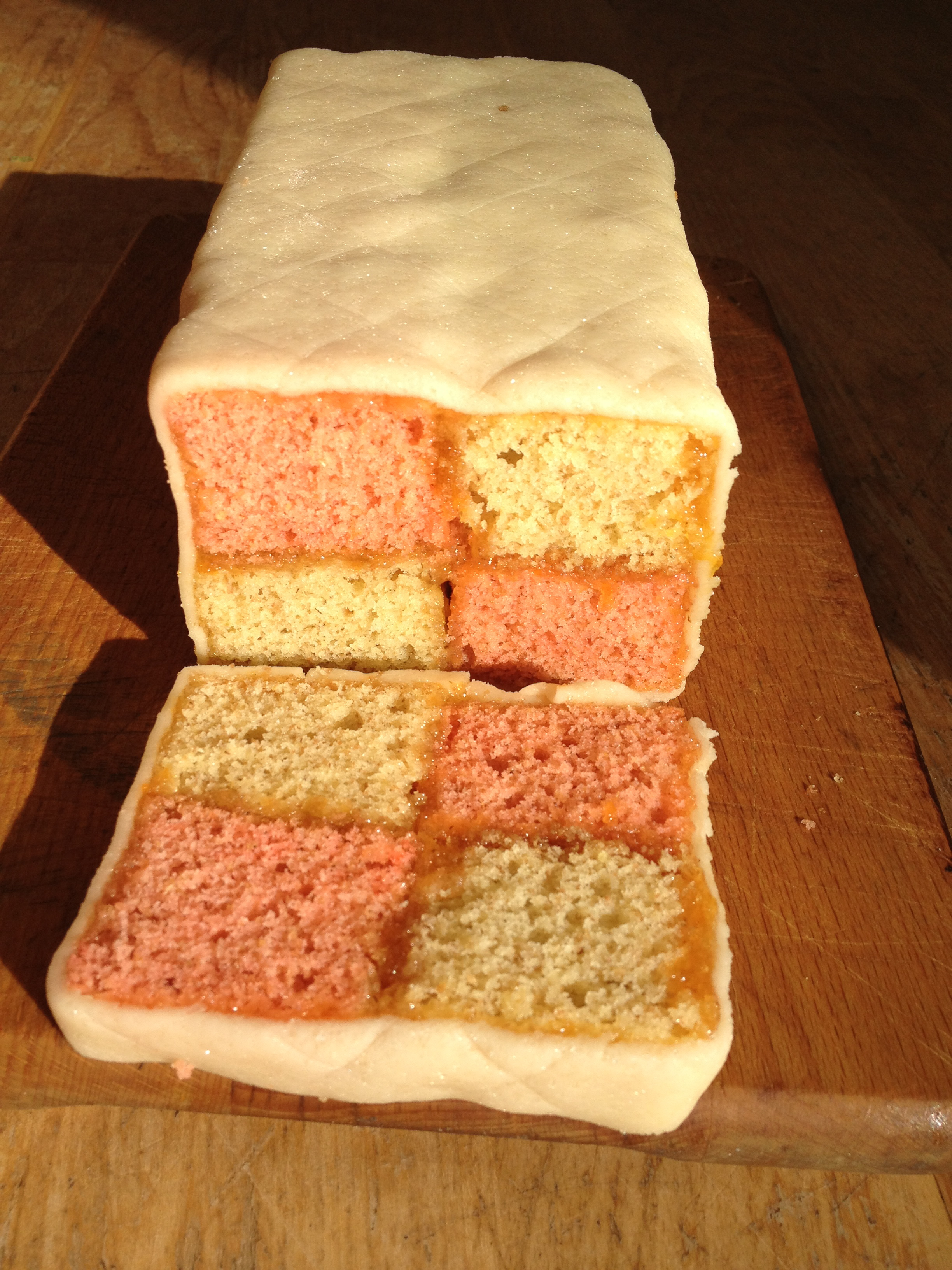 Battenberg cake